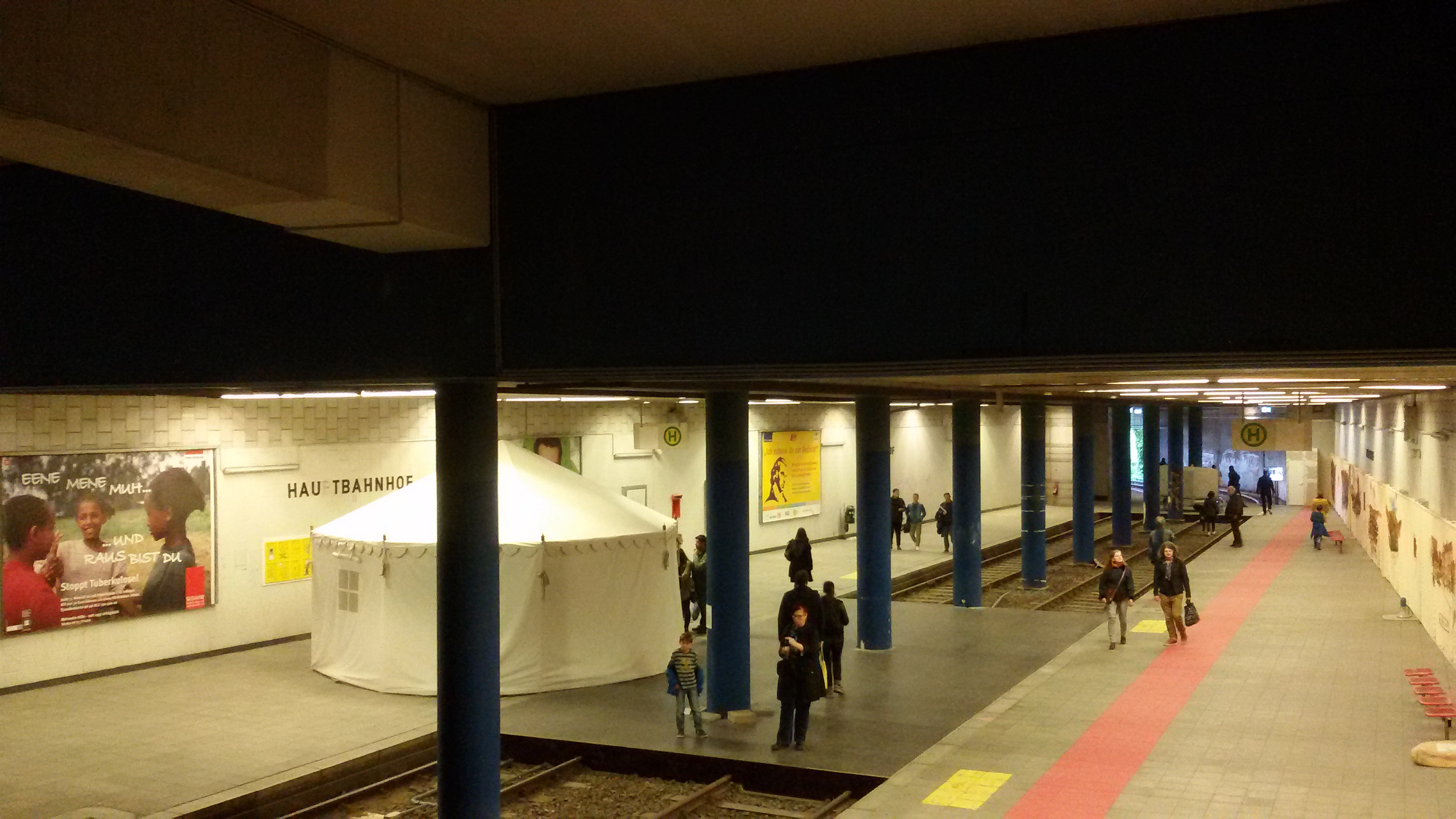 Auf dem Foto ist die ehemalige Straßenbahnunterführung unter dem Vorplatz des Kasseler Hauptbahnhofs zu sehen